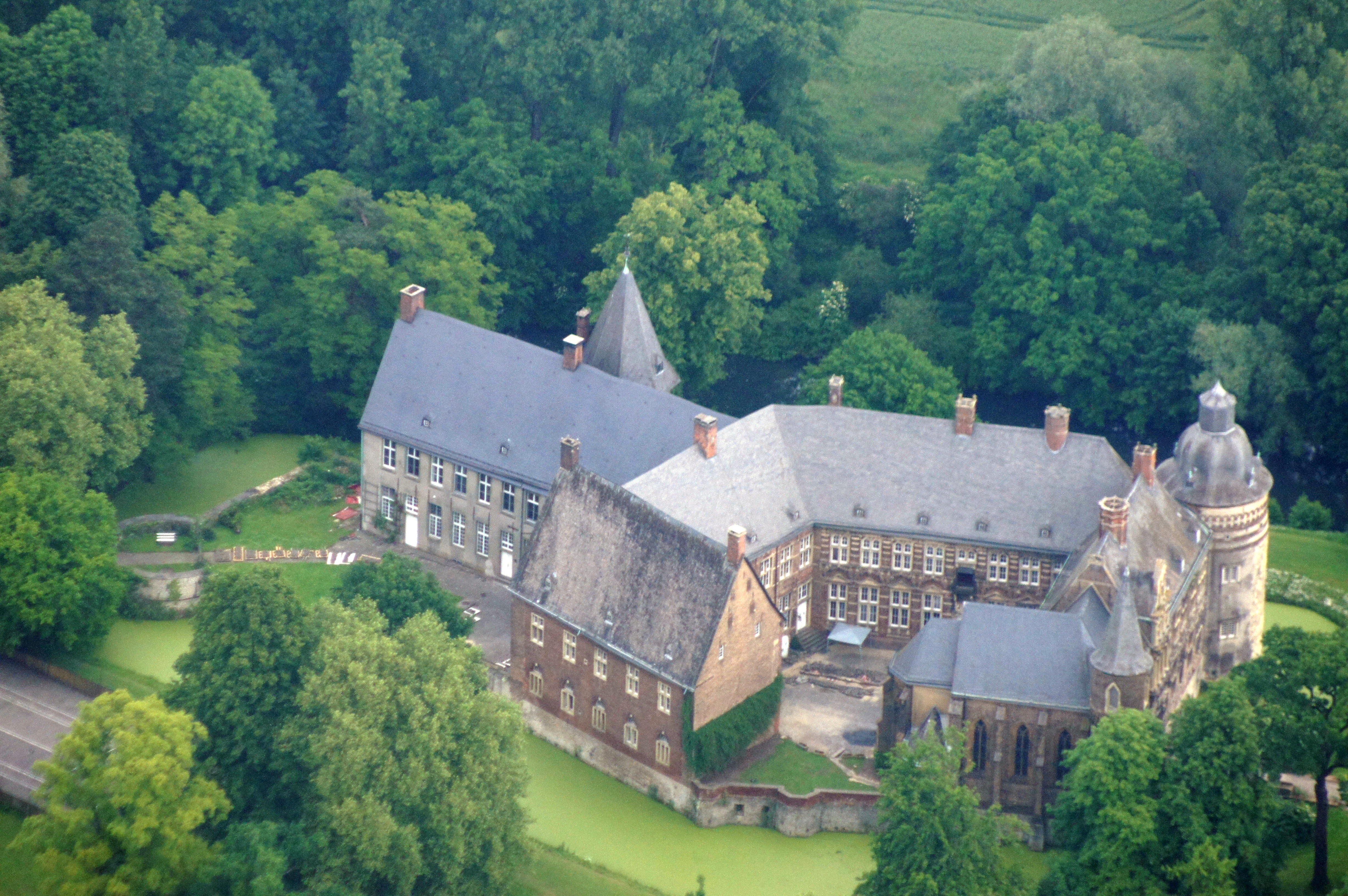 Haus Assen ist ein Wasserschloss in Lippborg, Gemeinde Lippetal, Kreis Soest, Nordrhein-Westfalen. Das Bild entstand während des Münsterland-Fotoflugs am 1. Juni 2014. Hinweis: Die Aufnahme wurde aus dem Flugzeug durch eine Glasscheibe hindurch fotografiert.